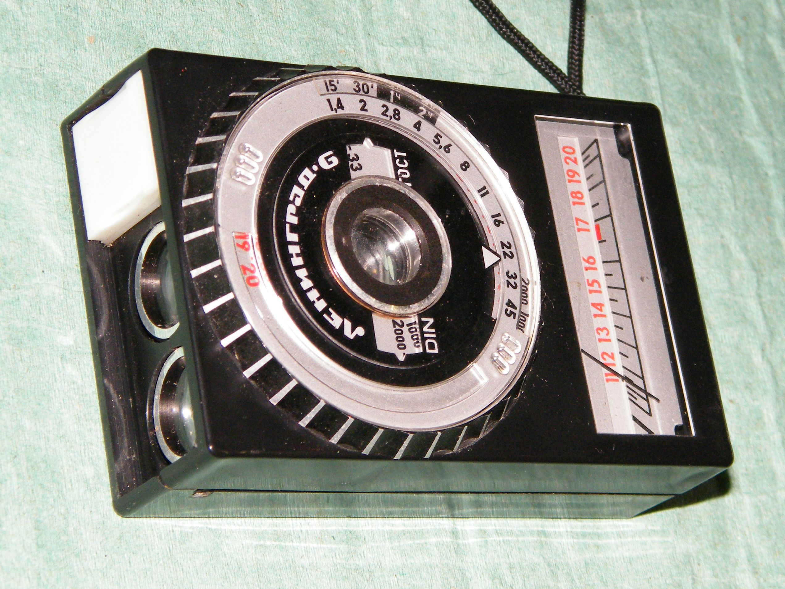 Фотоэкспонометр "ленинград-6", СССР, середина 1980-х годов.